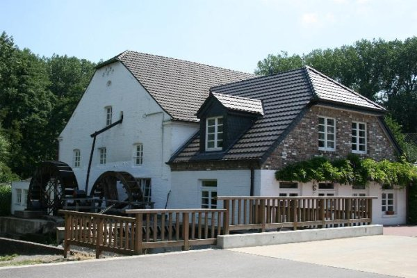 Denkmal Nr. 106 in Schwalmtal-Amern